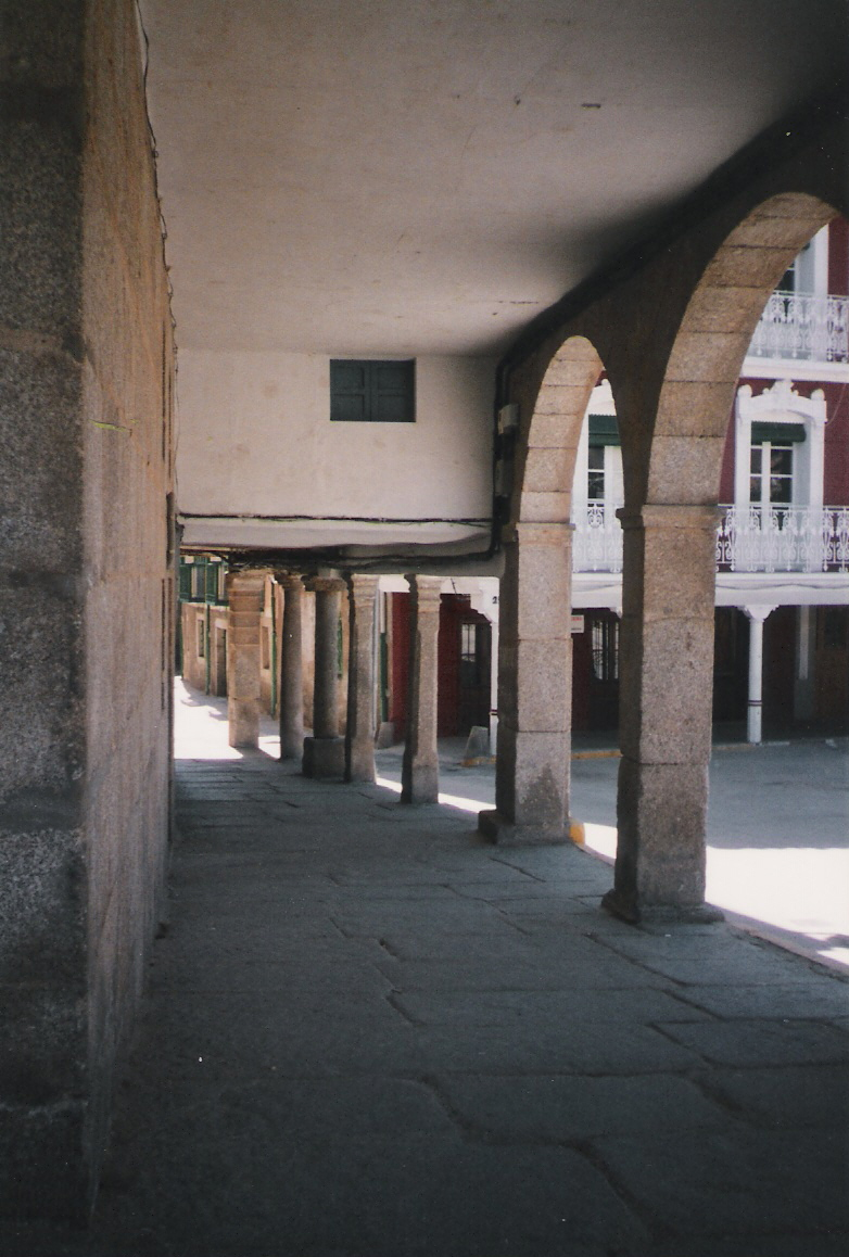 Soportales en Piedrahíta (Ávila).